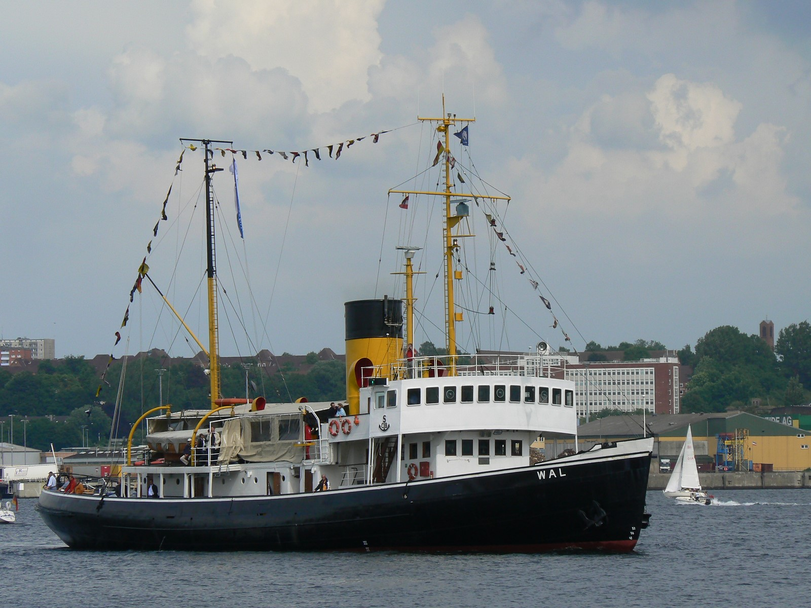 Dampf-Eisbrecher Wal auf der Kieler Woche 2007. Baujahr 1938, seit 1965 ölgefeuerte Kessel, seit 1990 Museumsschiff. IMO number : 8862662 Call Sign : DFDR Gross tonnage : 636 Year of build : 1938